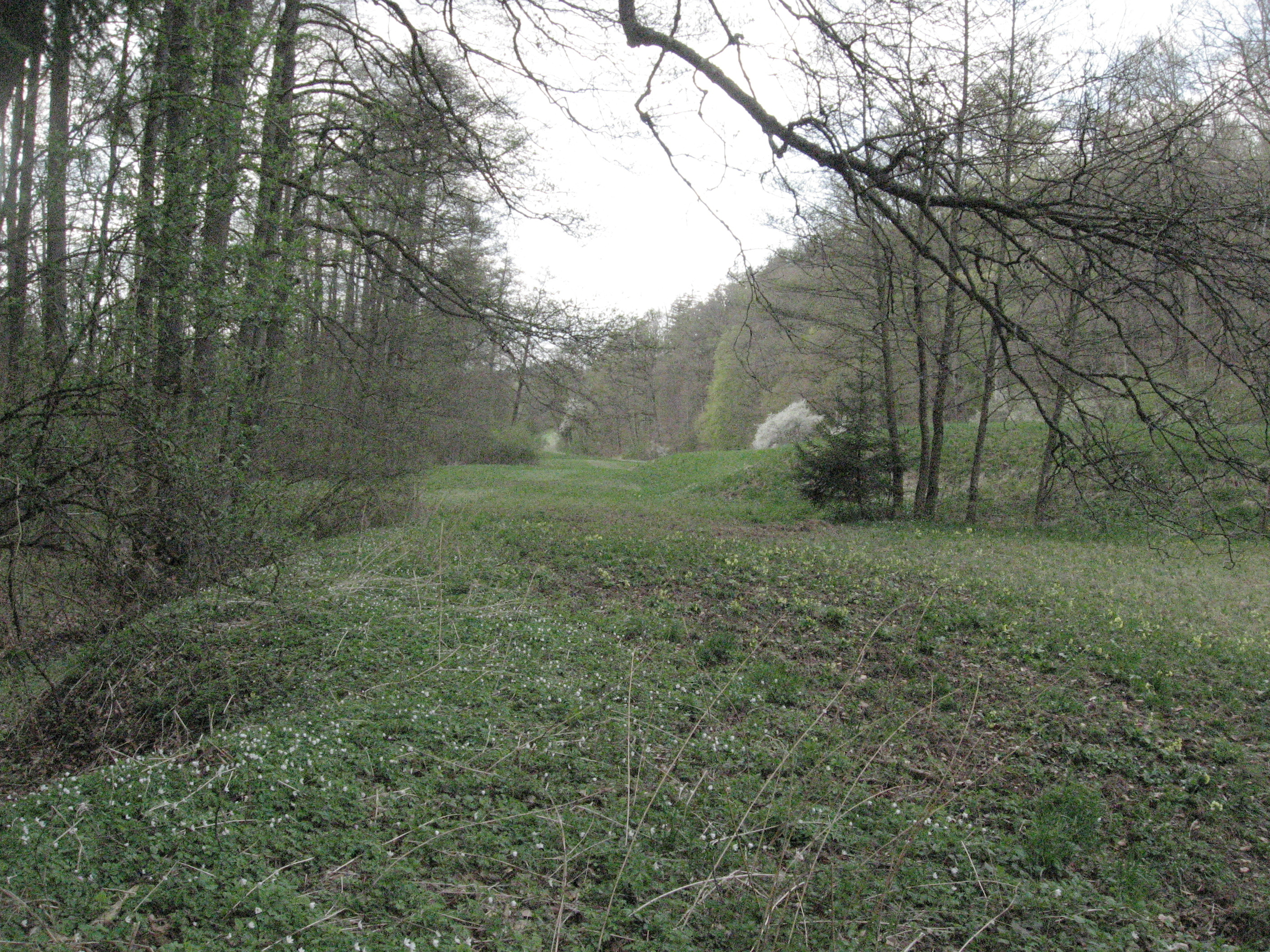 Talwiese rechts des Mailandbaches eben noch auf Obersontheimer Flur etwa 900 m W des Frankenhardter Weilers Hinteruhlberg. Der Mailandbach ist nach dem Schenkenbach der zweitgrößte linke Zufluss des Nesselbachs.